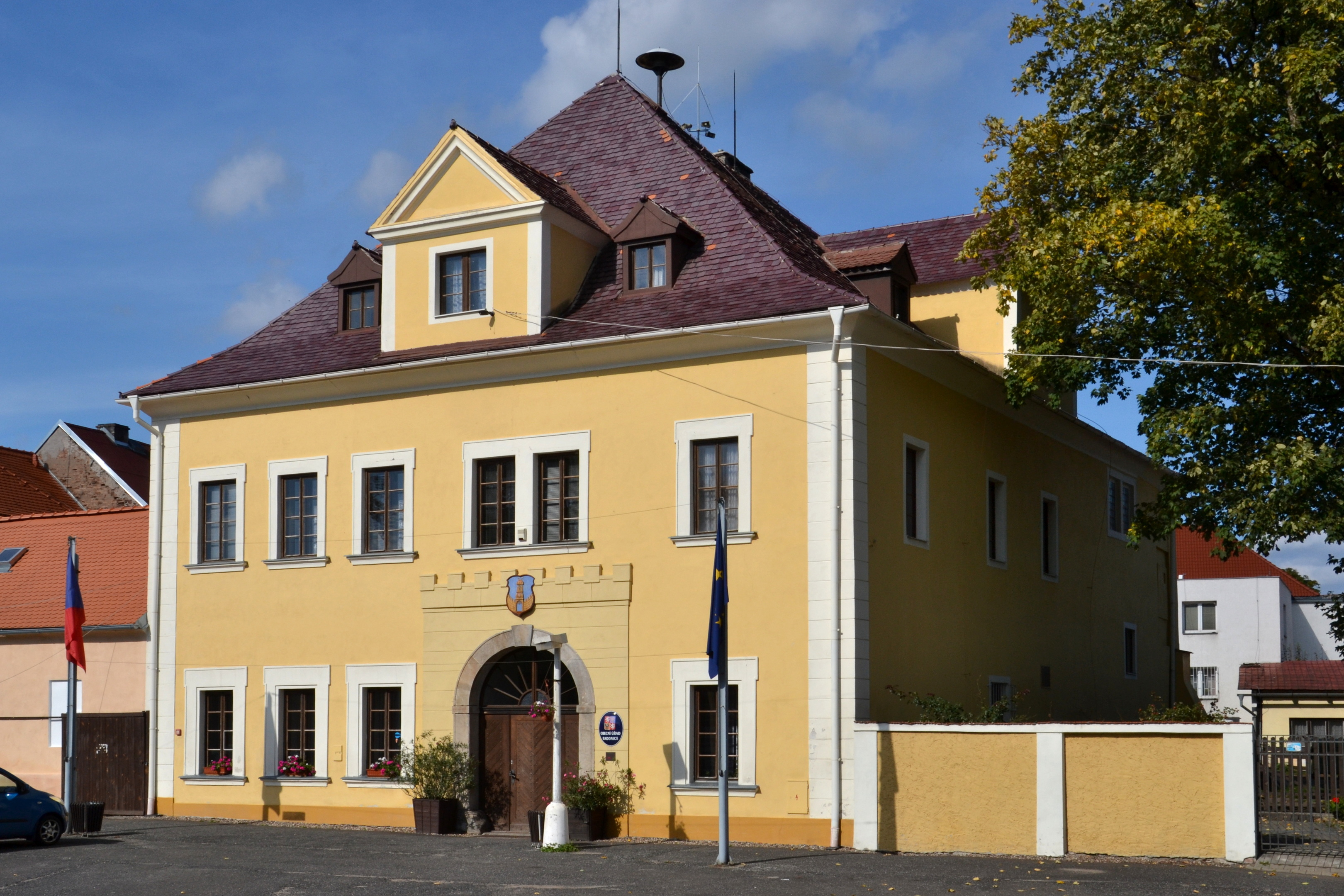 Radnice (Radonice), Radonice 1